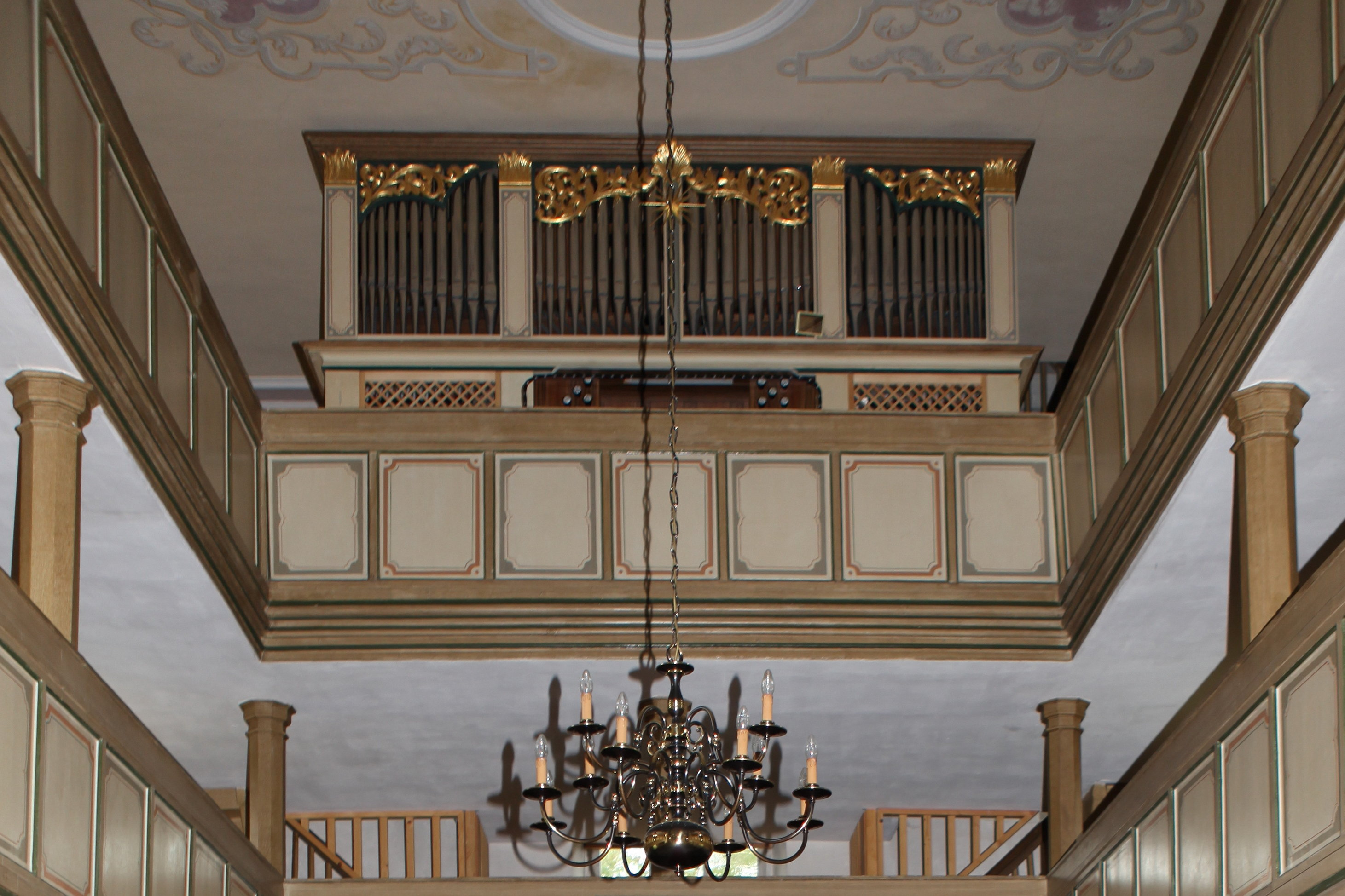 Heldritt-St.-Nikolaus-Orgel